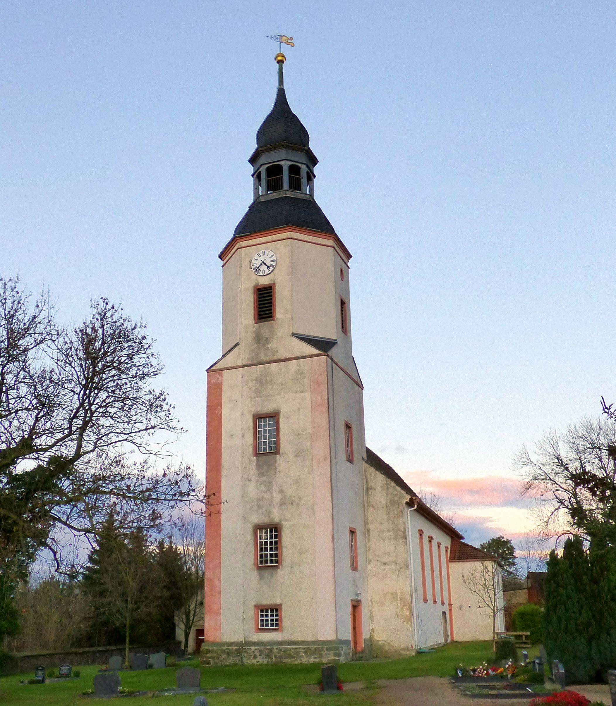 Dorfkirche Fichtenberg (Mühlberg/Elbe)